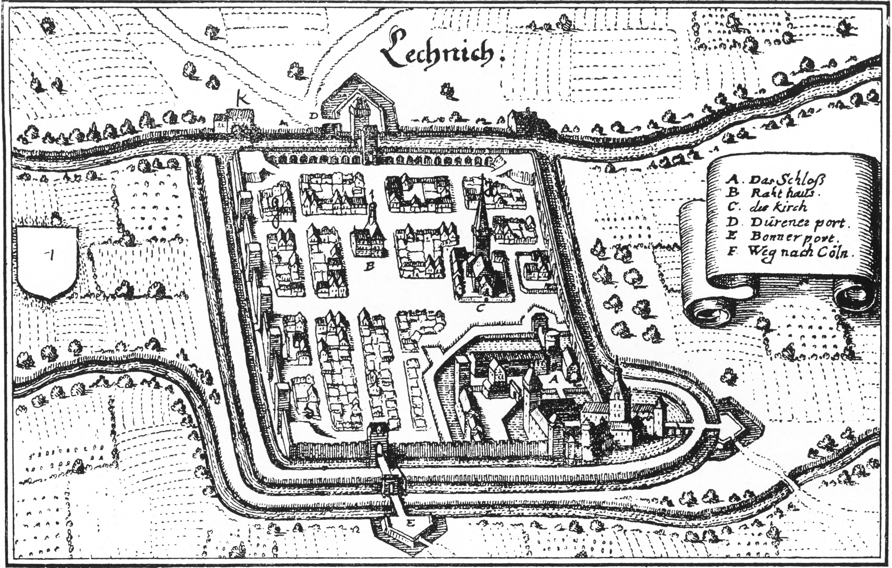 Lechenich nach einer Ansicht von Matthäus Merian aus dem Jahr 1646